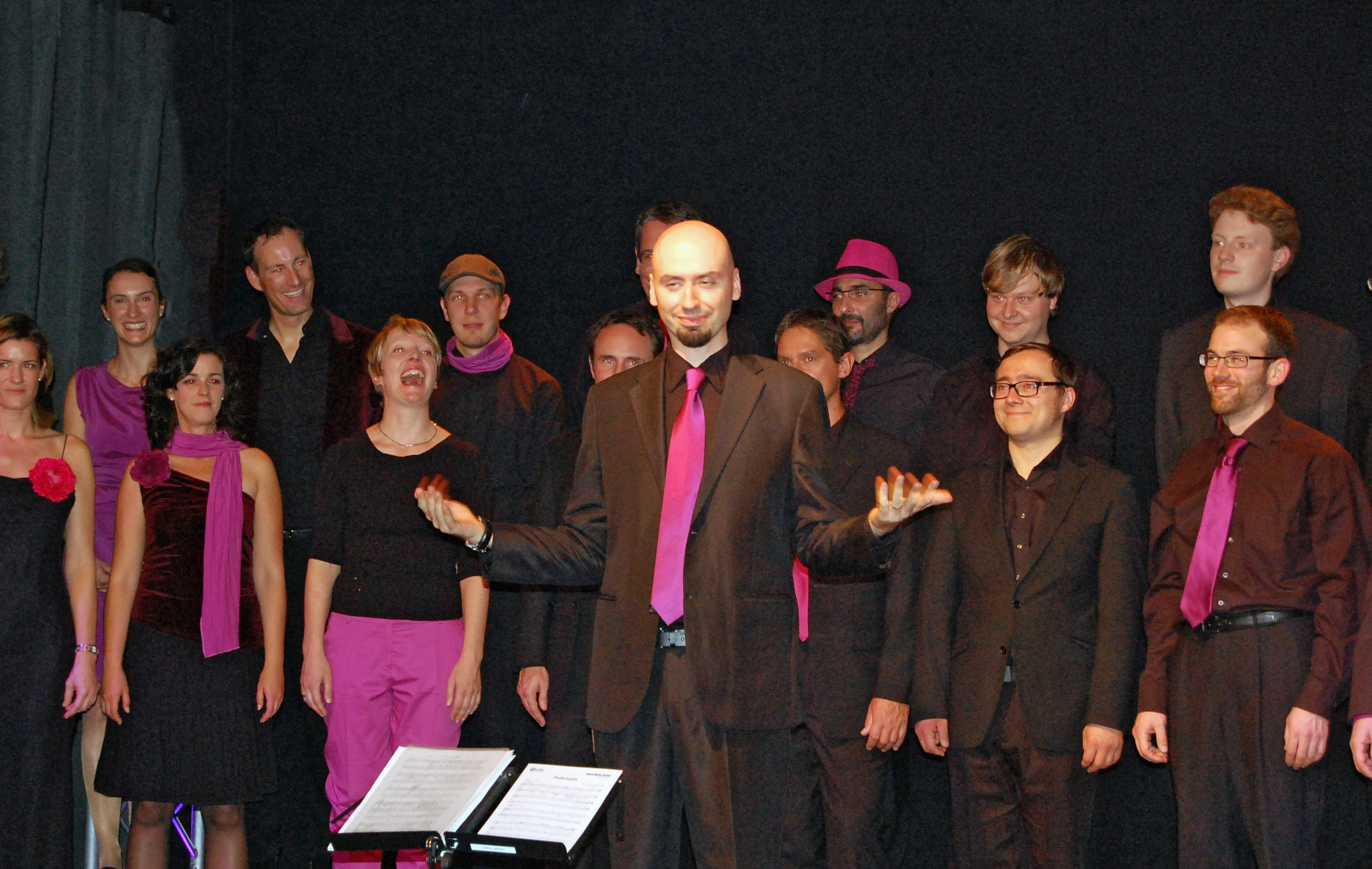 Der Münchner Don Camillo Chor mit seinem Chorleiter Andrea Figallo